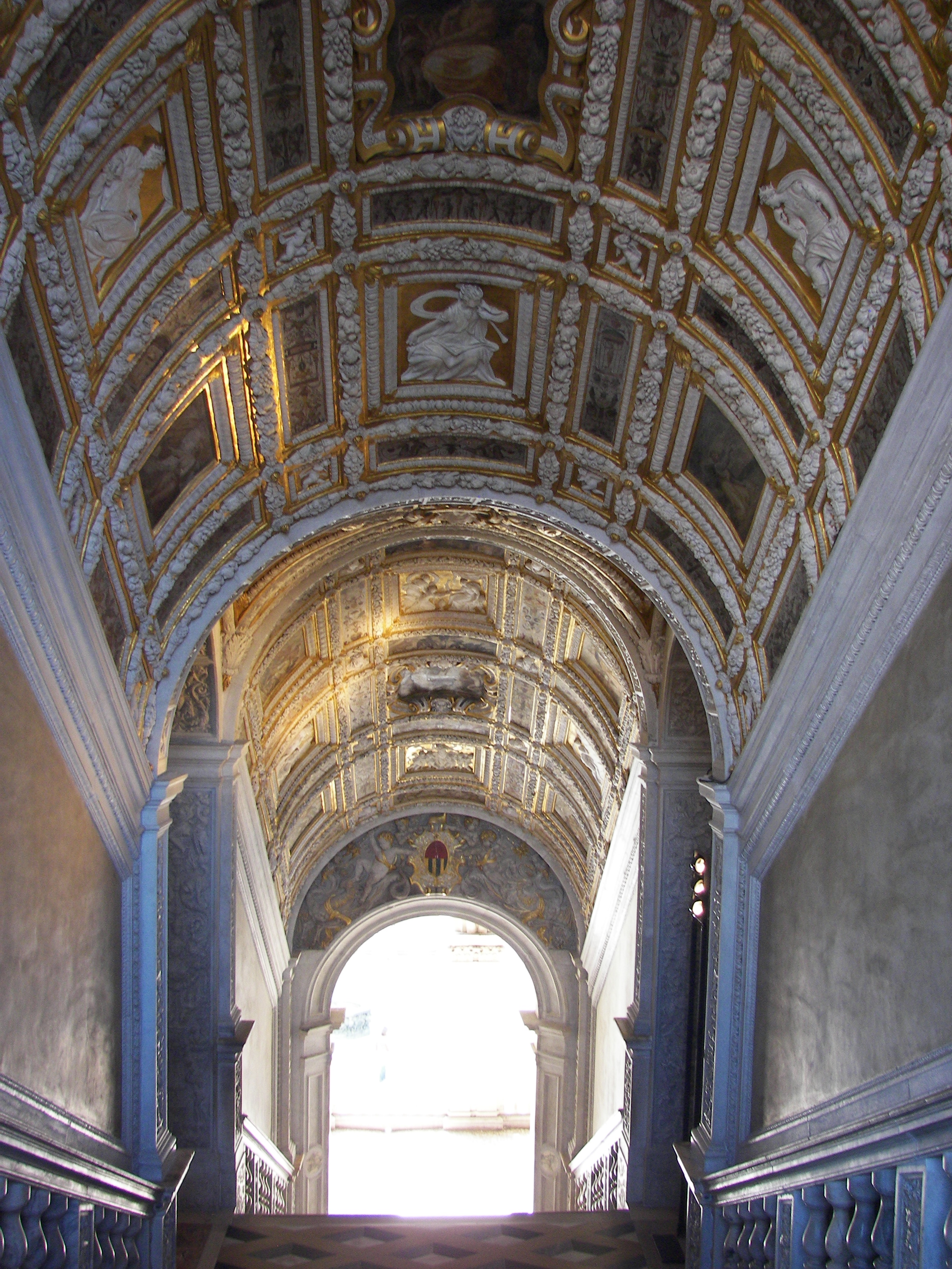 Scala d'Oro in the Doge's Palace in Venezia.